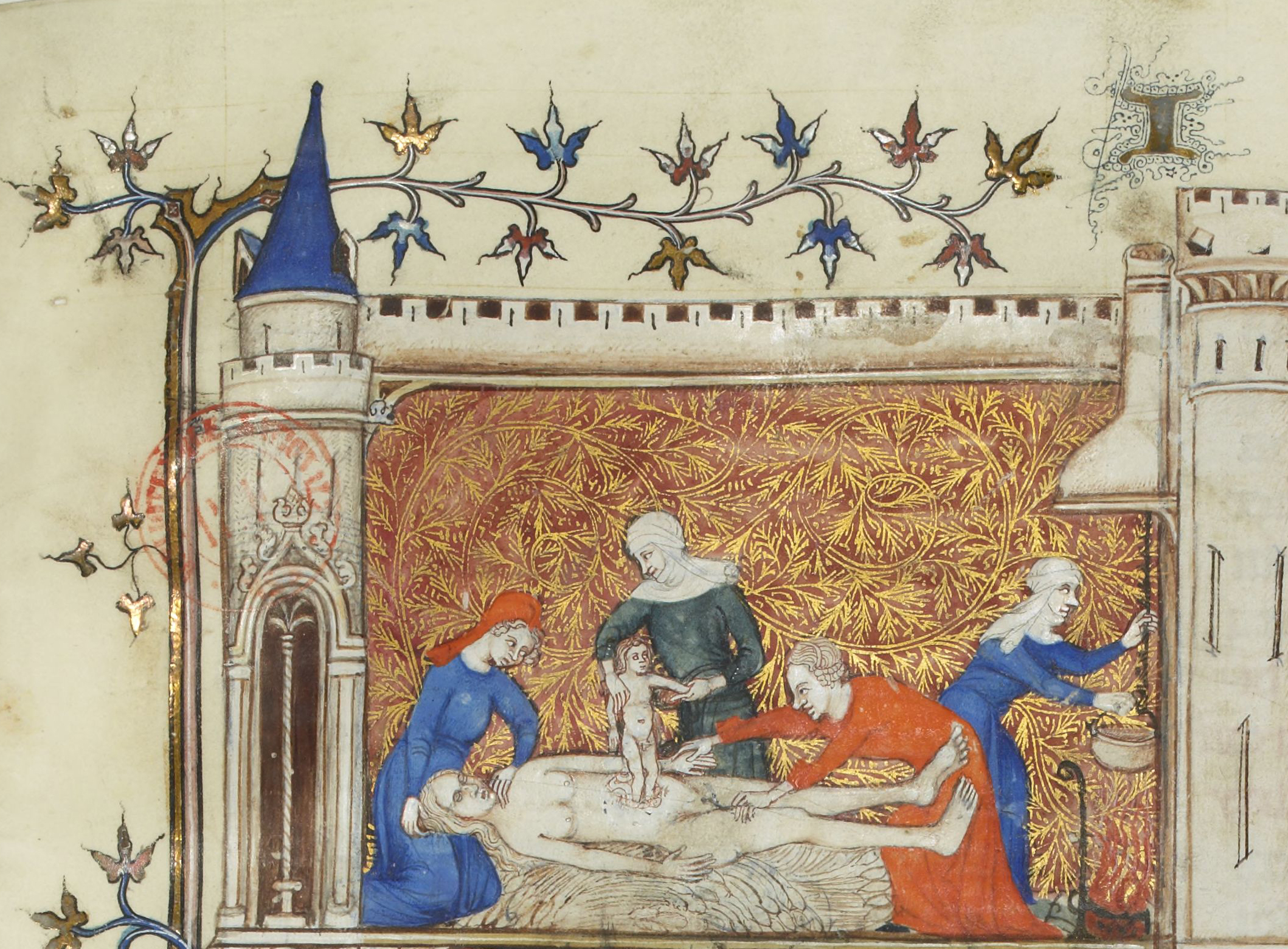 Miniature. Les Faits des Romains, BnF, NAF 3576, fol. 197.